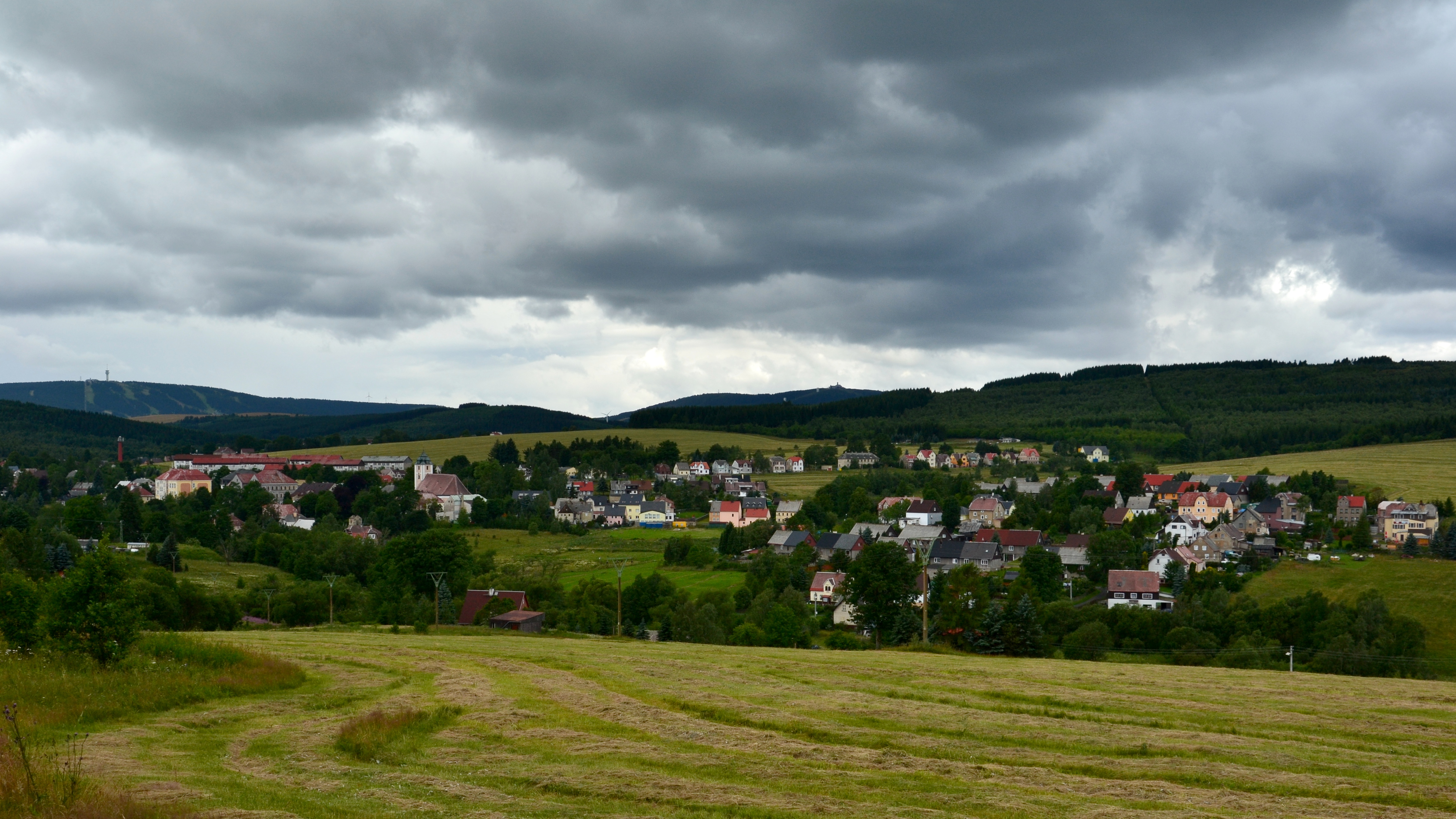 Celkový pohled